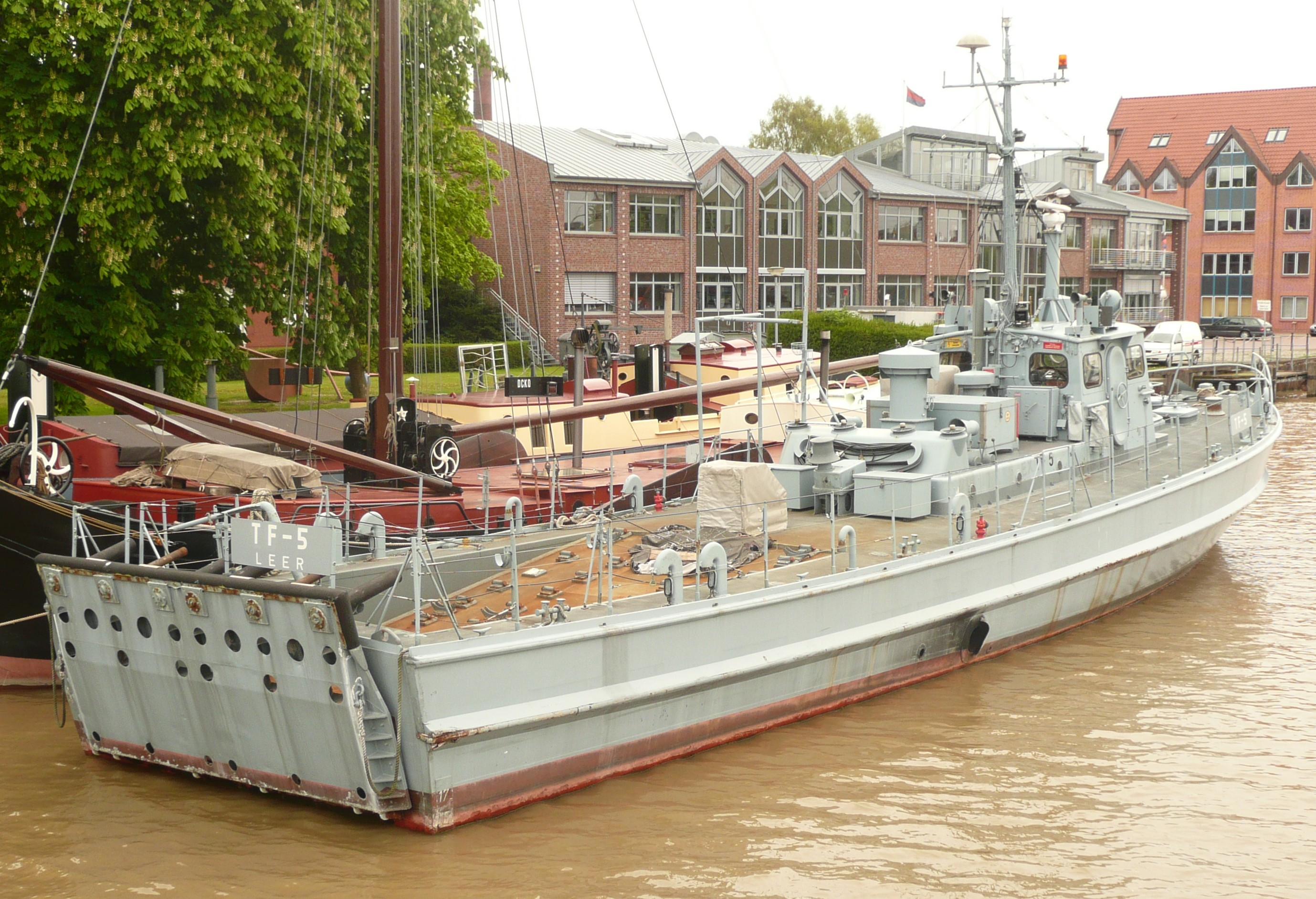 ehemaliges Torpedofangboot TF 5 der Klasse 430 der Deutschen Marine nach der Außerdienststellung im Hafen von Leer (Ostfriesland), wo es als Museumsschiff Verwendung finden soll.